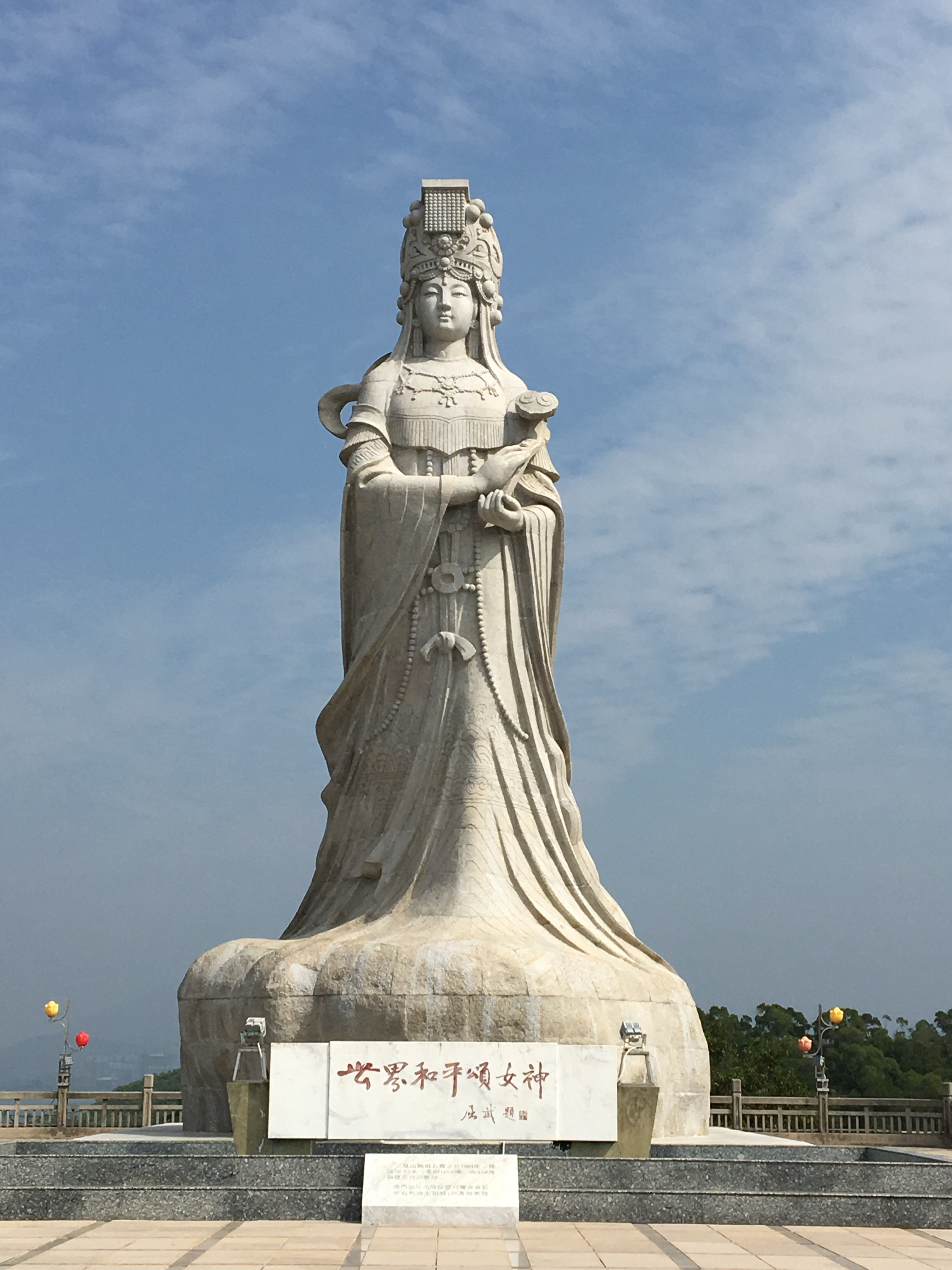 汕尾市鳳山媽祖石像